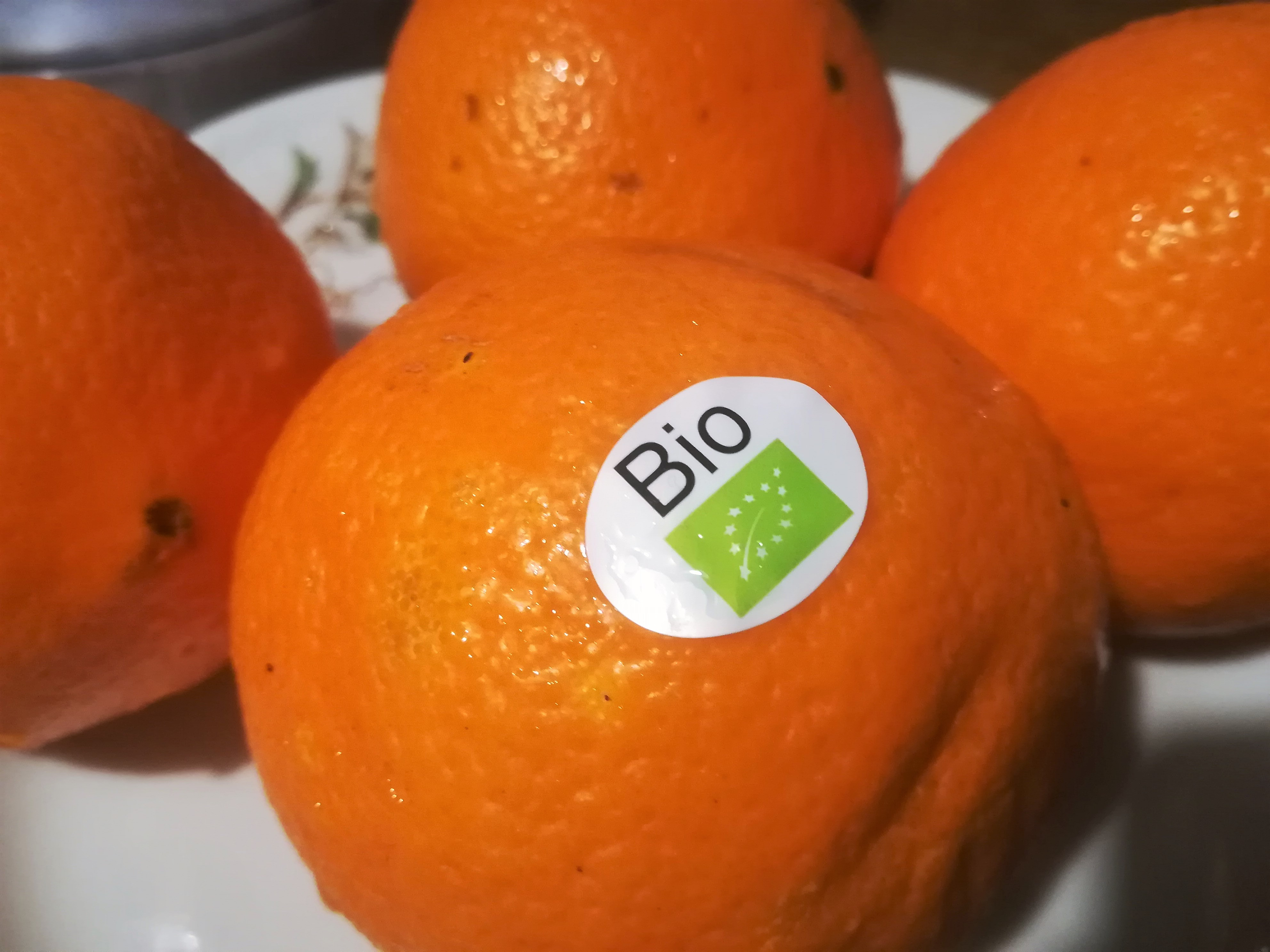 Bio pomarańcze (Poznań).